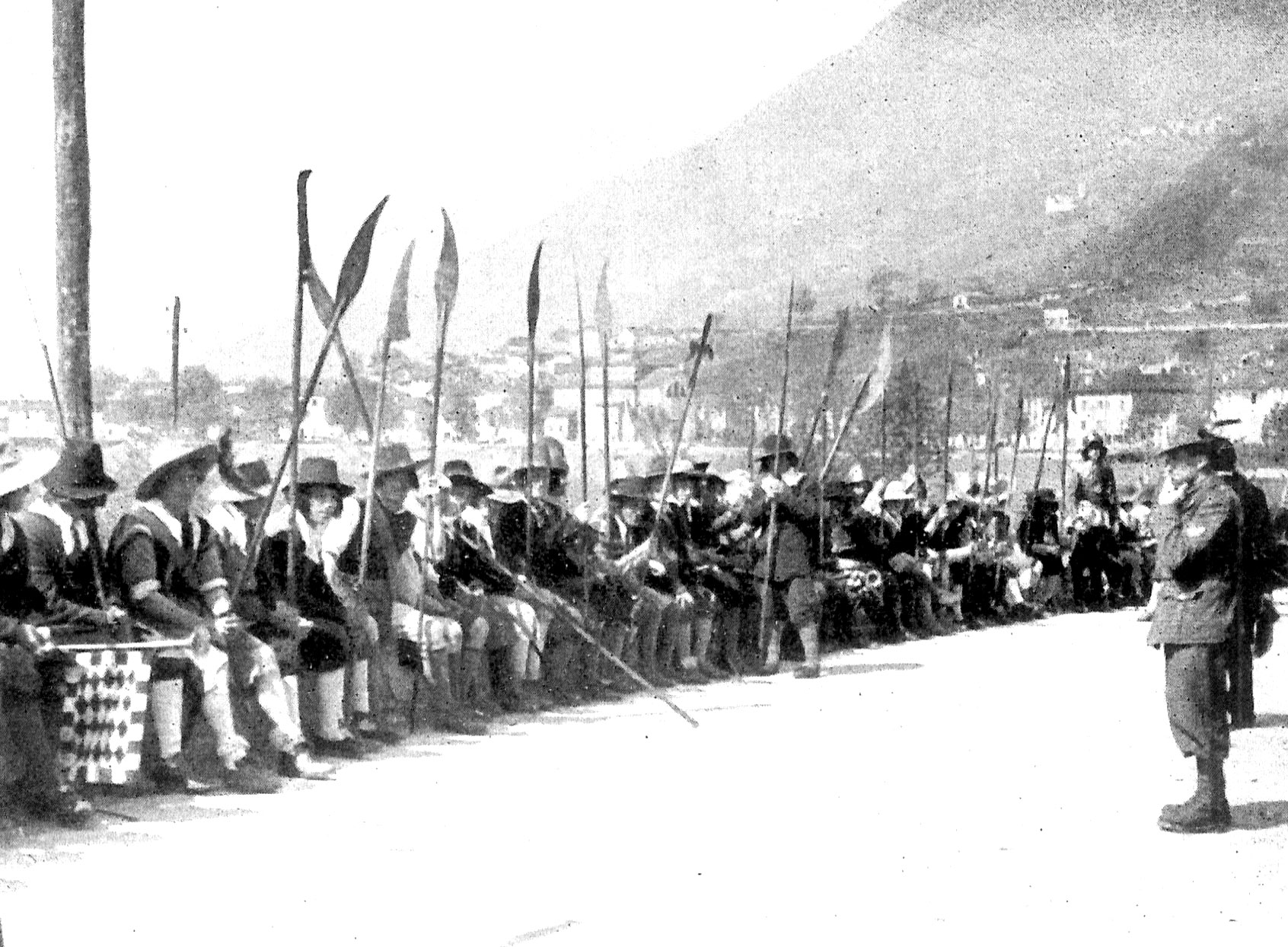 Comparse sul lago di Como ne "I promessi sposi" (Camerini, 1941)